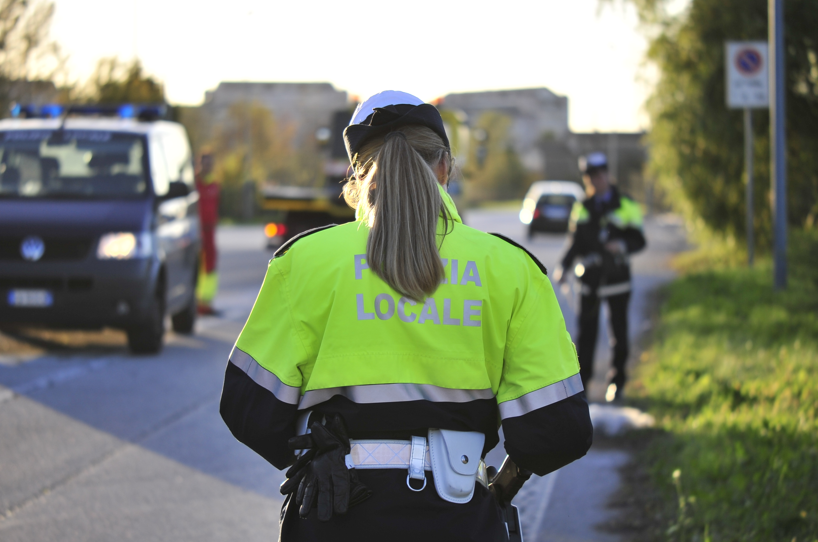 Polizia Locale durante il rilievo di un incidente stradale